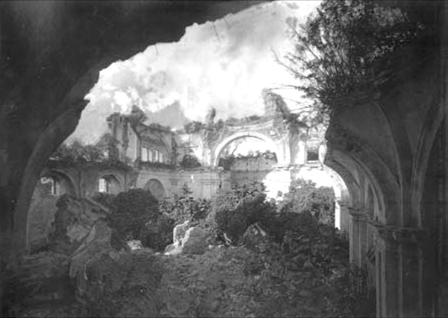 Interior del templo jesuítico en 1880, con los daños ocasionados por el terremoto del 3 de septiembre de 1874.